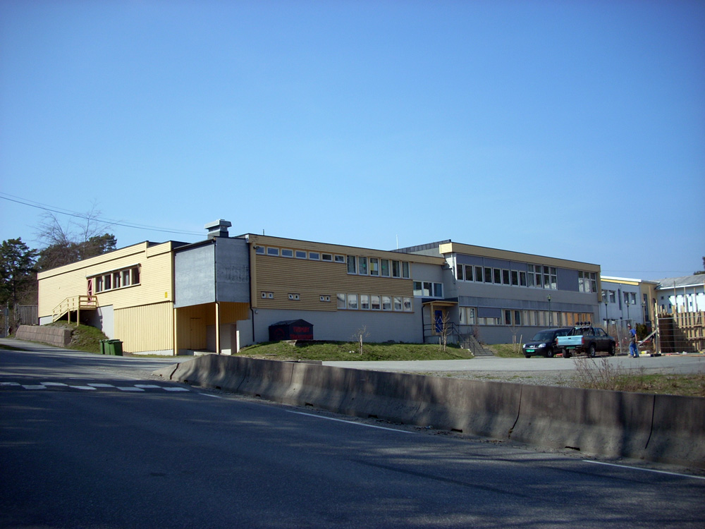 Sandnes skole på Tromøy, Arendal